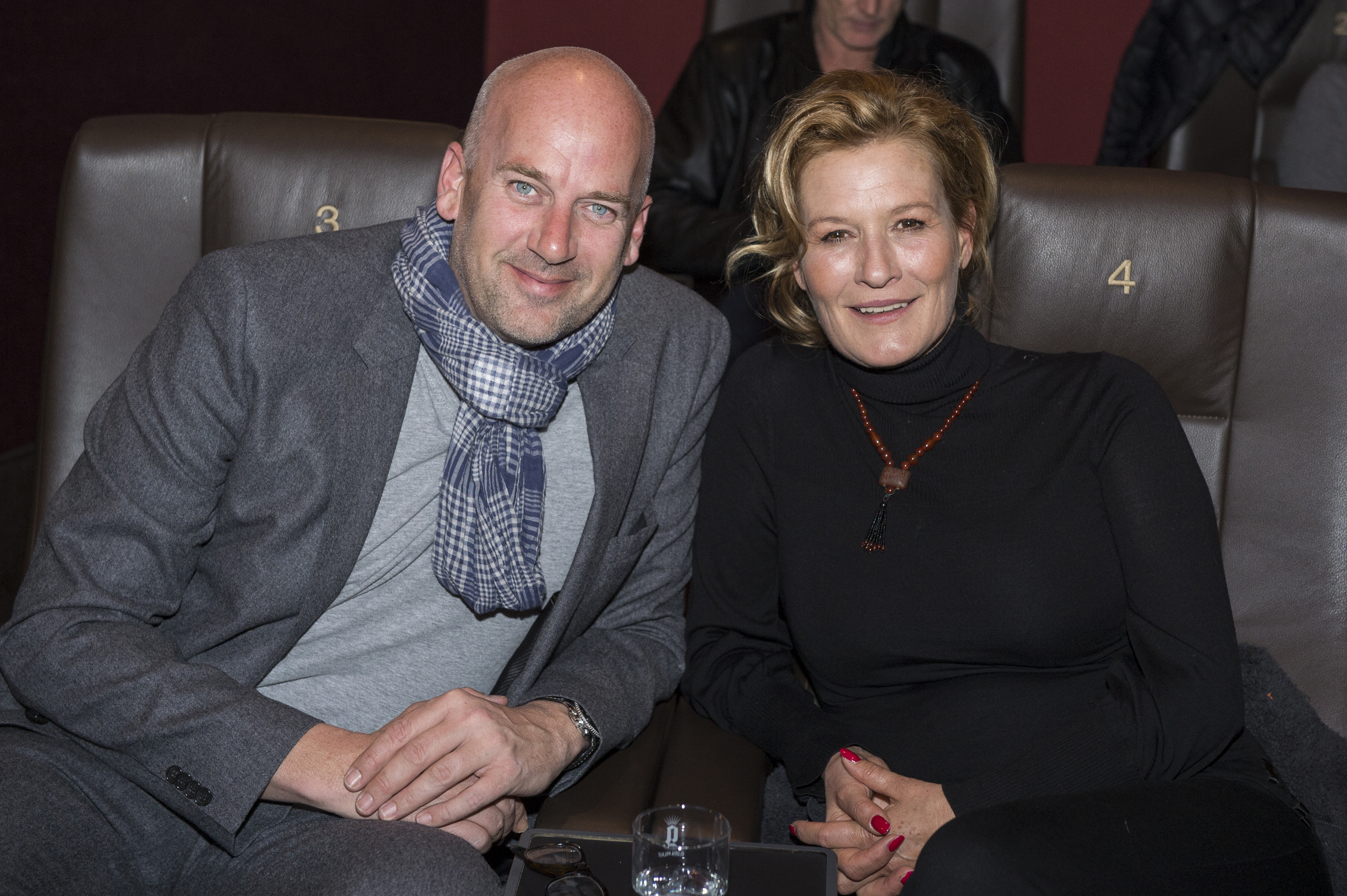 Bretonische Verhältnisse Premiere am 16.04.2014 in München Jens Schniedenharn, Susanne von Borsody